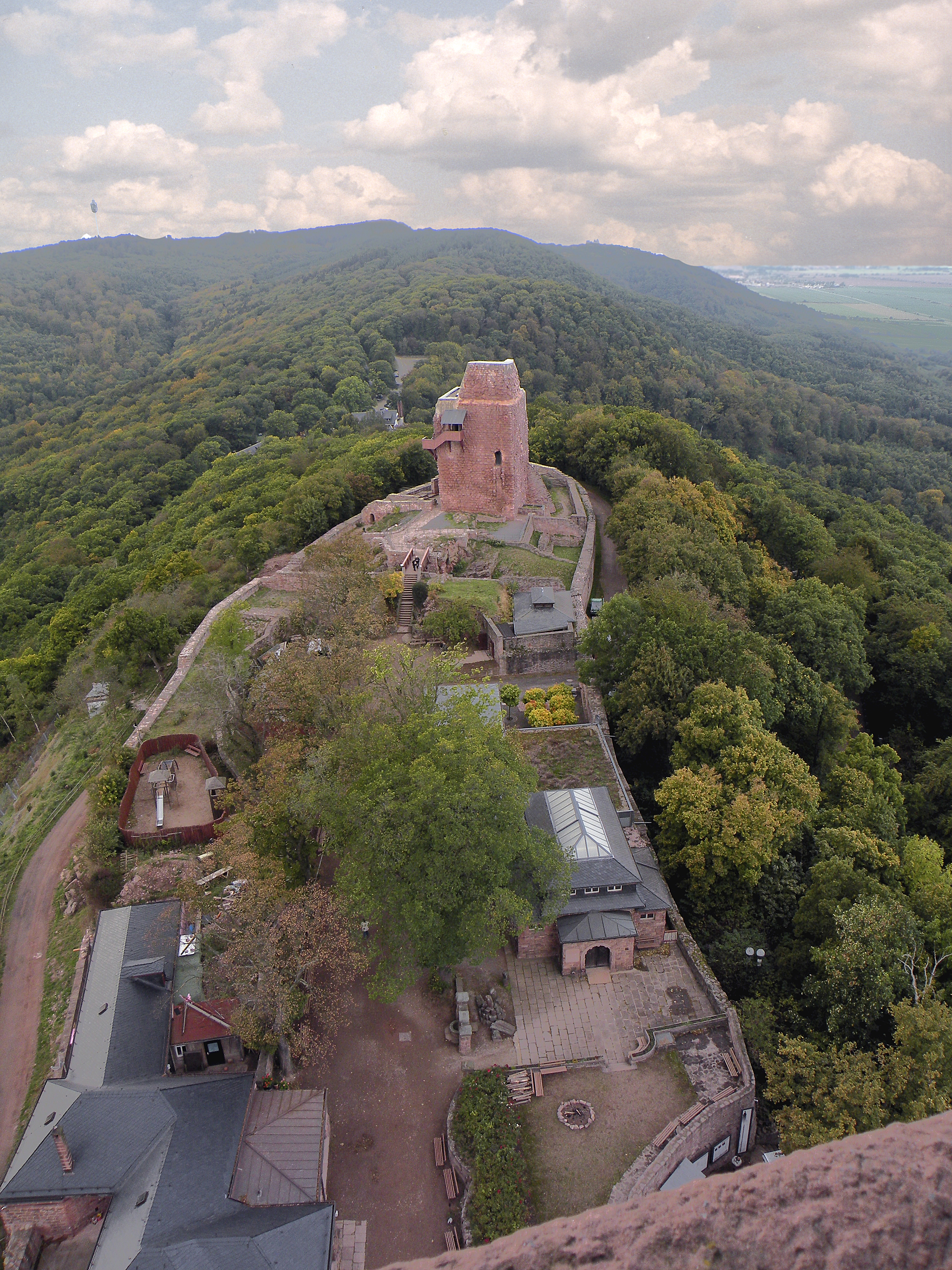 Тюрингия. Замок Кифхаузен